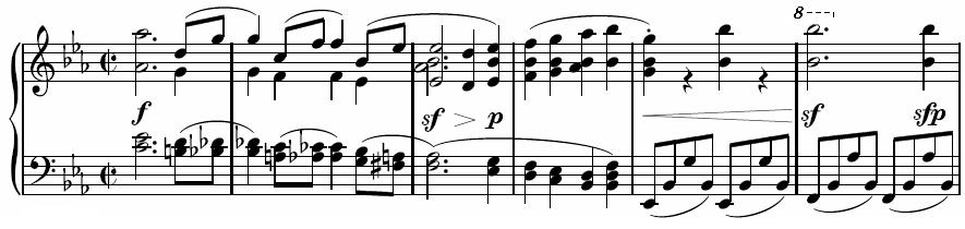 Description : Mesures 17 à 22 du premier mouvement de la sonate pour piano n° 26 de Beethoven Auteur : propre travail réalisé avec Lilypond Licence : Domaine public (auteur décédé depuis plus de 70 ans)